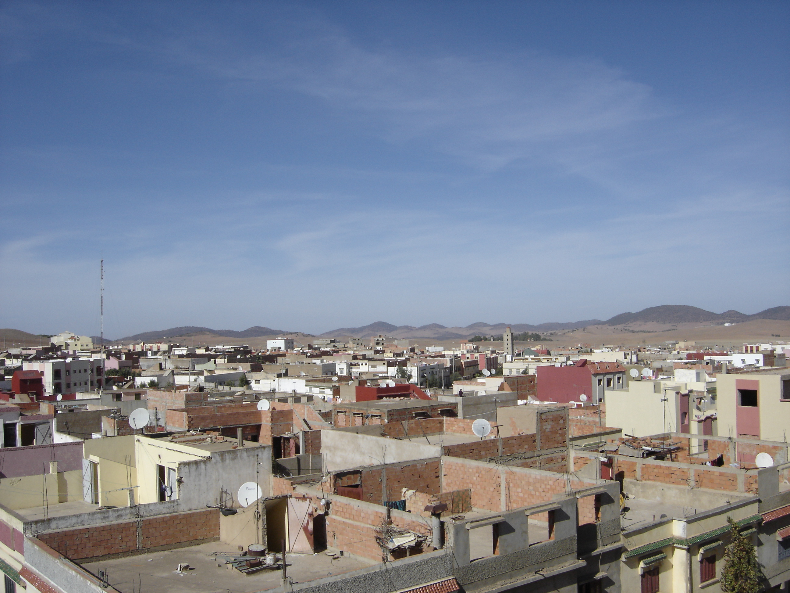 Vu D'Oulmès